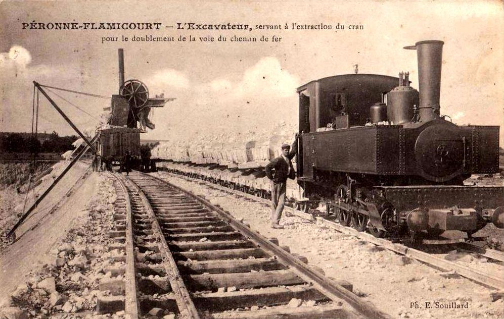 Travaux de doublement de la voie avec excavateur et train de chantier à voie étroite.